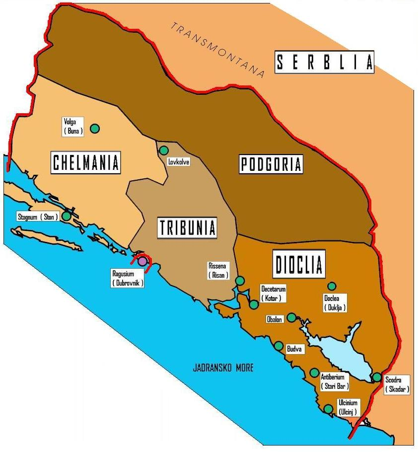 Дукљанска држава у вријеме владавине кнеѕа Војислава (око 1050. године). Ова графика је урађена на основу детаљније мапе из Историје за средње стр. школе, од Н. Мршуља, Л.Радуловић, Ж.Дринчић и З. Пејовић- Завода за уџбенике и наставна стедства, Подгорица,из 2003. године.